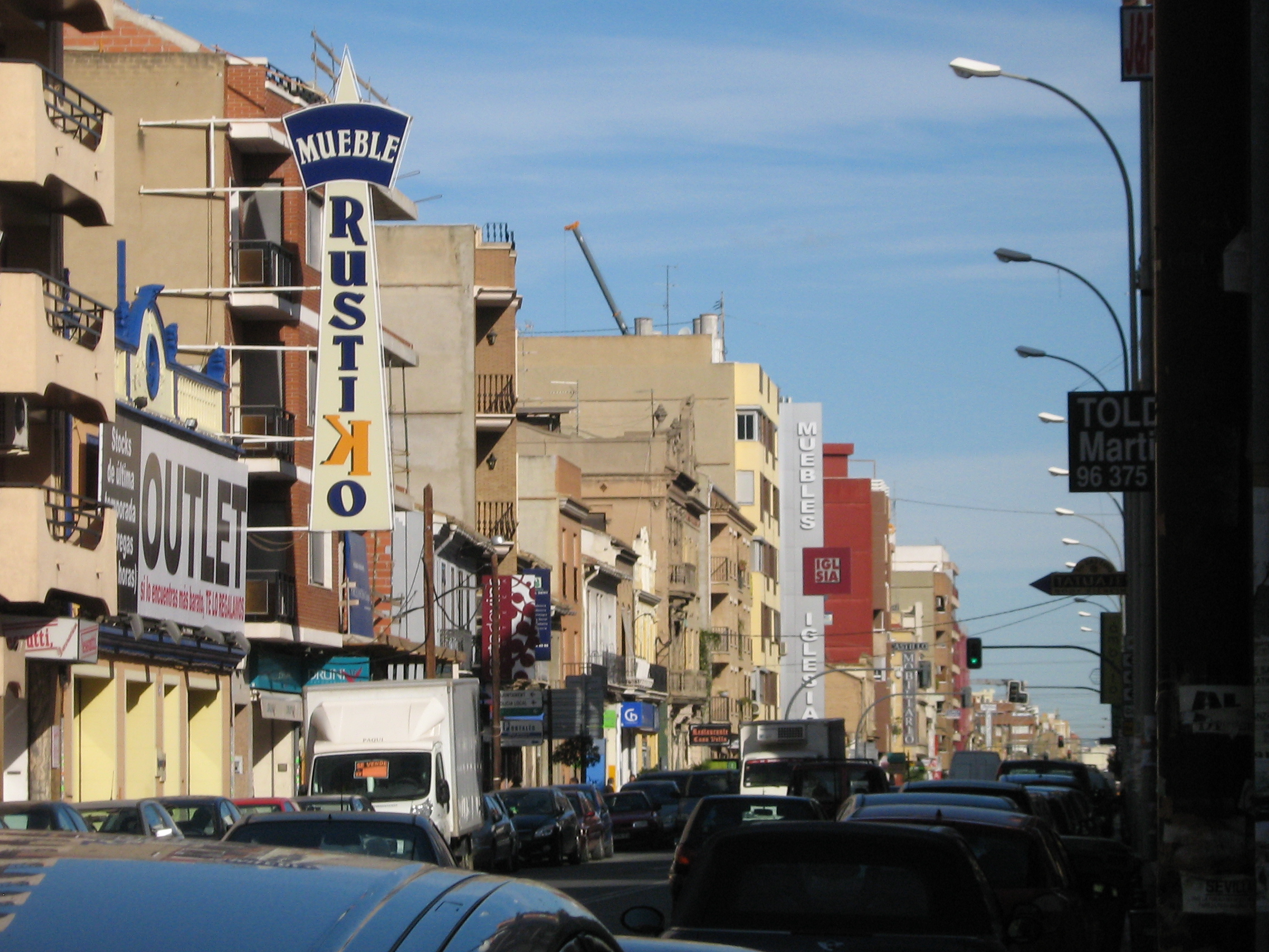 Camí Nou Benetússer